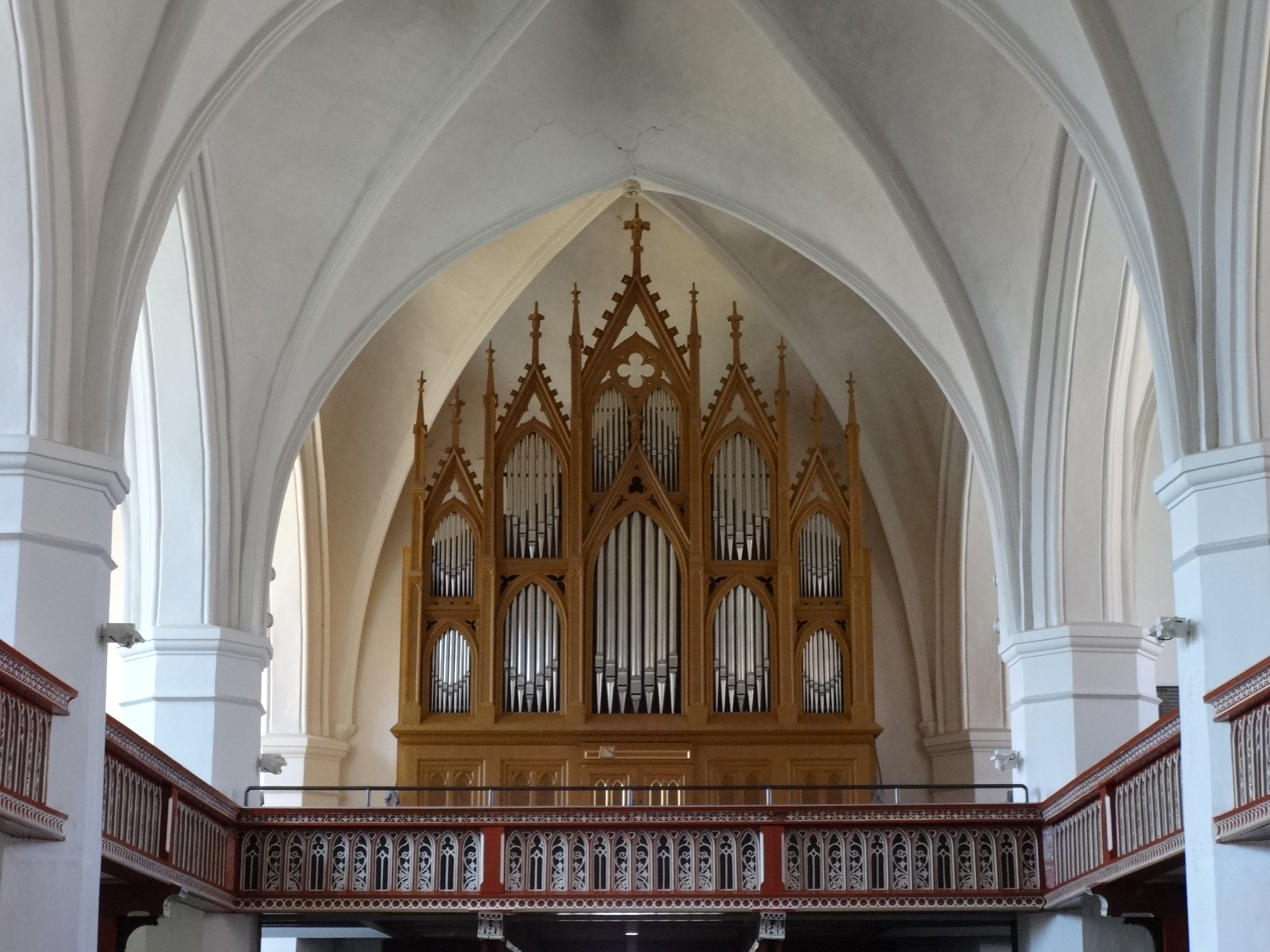 St. Jacobi, evangelische Stadtkirche in Nauen, Havelland, Brandenburg